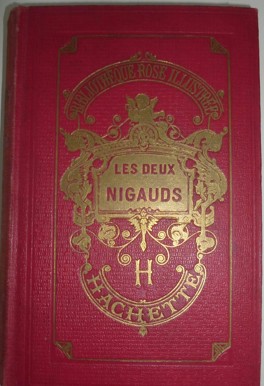 Comtesse de Ségur, Les Deux Nigauds, Bibliothèque rose, Hachette, éd. 1900.